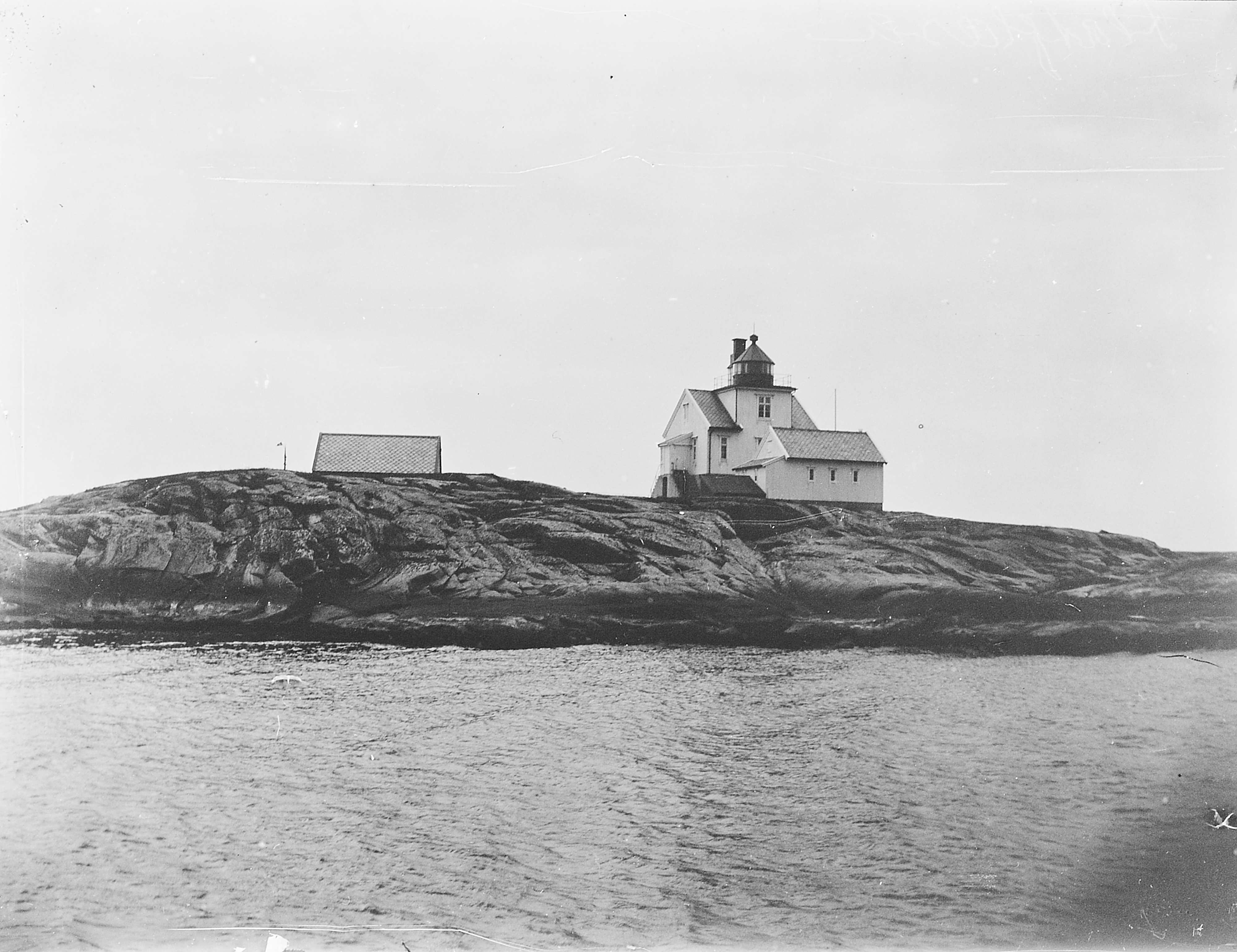 Bildet er hentet fra Arkivverket. Flatflesa, Sandøy Arkivinstitusjon : Riksarkivet Arkivnavn : Fyrdirektoratet Sted : Norge, Møre og Romsdal, Sandøy, Flatflesa Emneord: Fyr, Kyst Avbildet